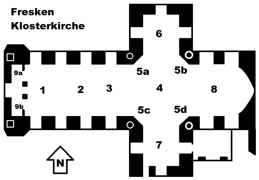 schematischer Grundriss, Klosterkirche Münsterschwarzach, Darstellung der Fresken: Legende: 1. "Gründung durch Megingaud und Ima 815", 2. "Marter der hl. Felizitas", 3. "Zweifache Marter des hl. Sebastian", 4. "Glorie der heiligen des Benediktinerordens", 5a. "BenediktsTugendweg", 5b. "Sieg der Religion", 5c. "Triumph der Religion", 5d. "Niederwerfung des Heidentums", 6. "Gregor VII.", 7. "Papst Gregor I. sendet Augustinus und Mellitus nach England", 8. "Verklärung Christi auf Tabor", 9a. "Zweite Gründung 1047", 9b. "Innozenz IV. bestätigt 1252 Rechte"